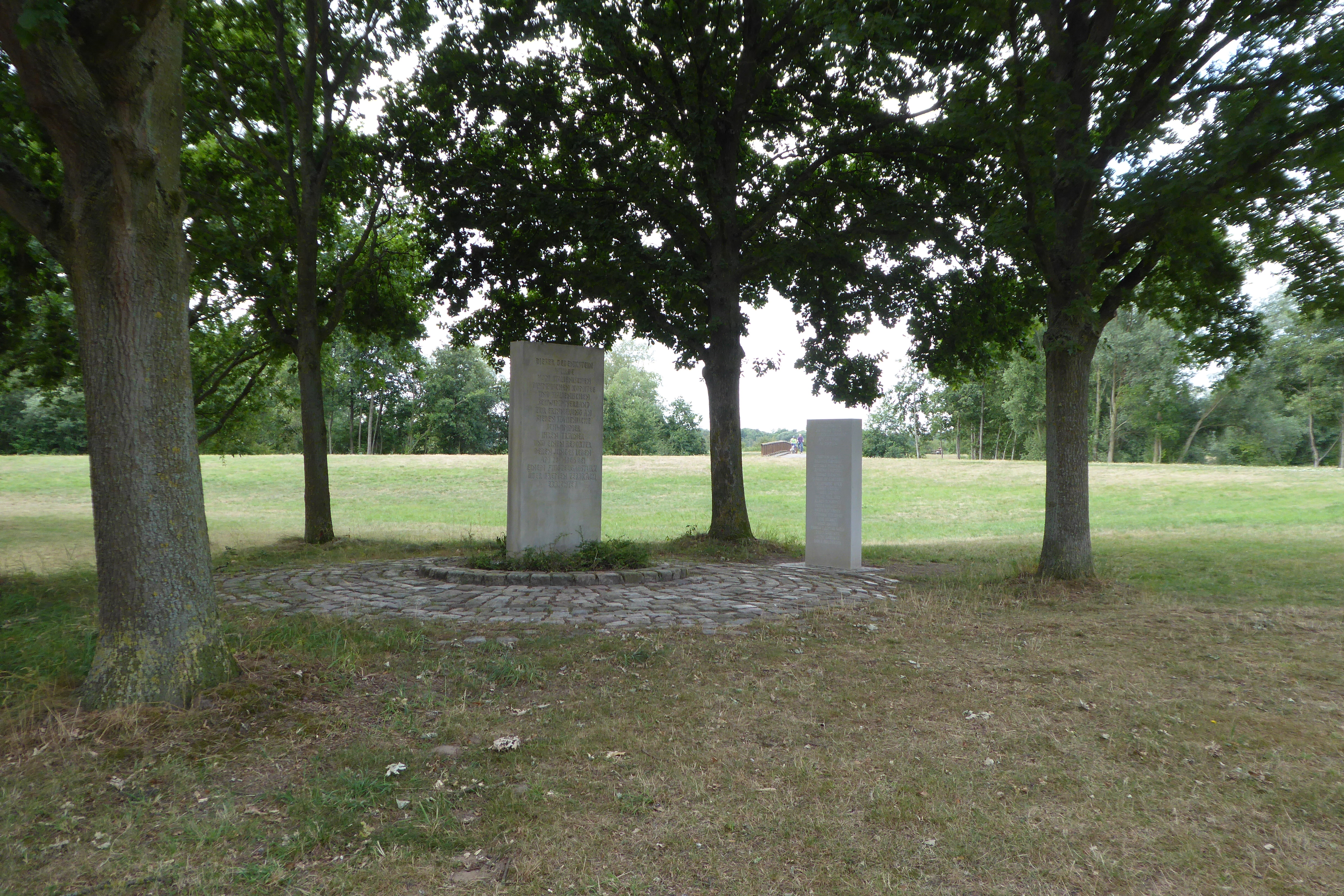 Bremen-Grolland, Norderländer Straße: Gedenkstätte für die 46 Opfer des Absturzes der Lufthansa-Maschine D-ACAT am 28. Januar 1966 (Lufthansa-Flug 005)